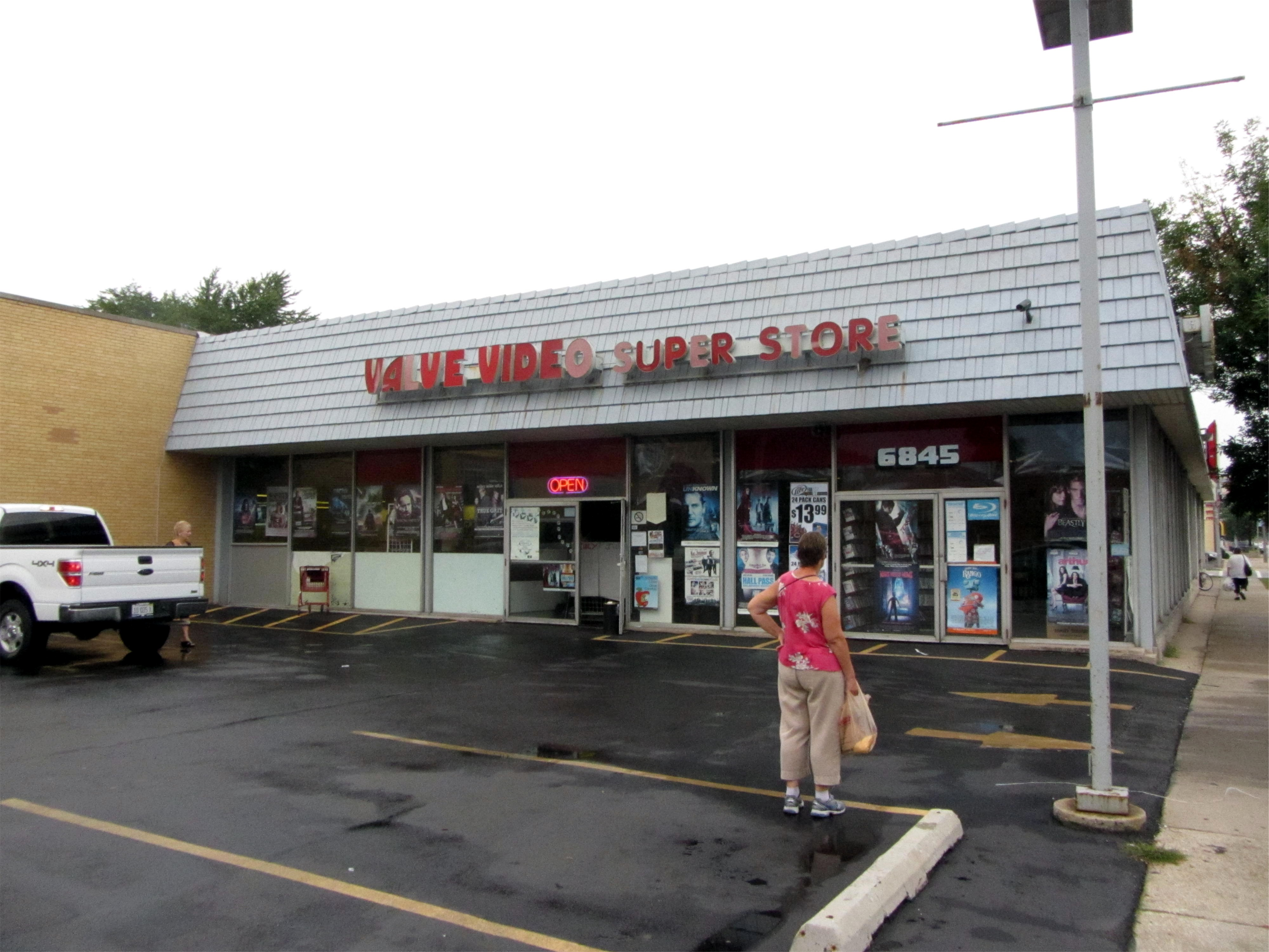 Video Rental Store, Berwyn, Illinois.